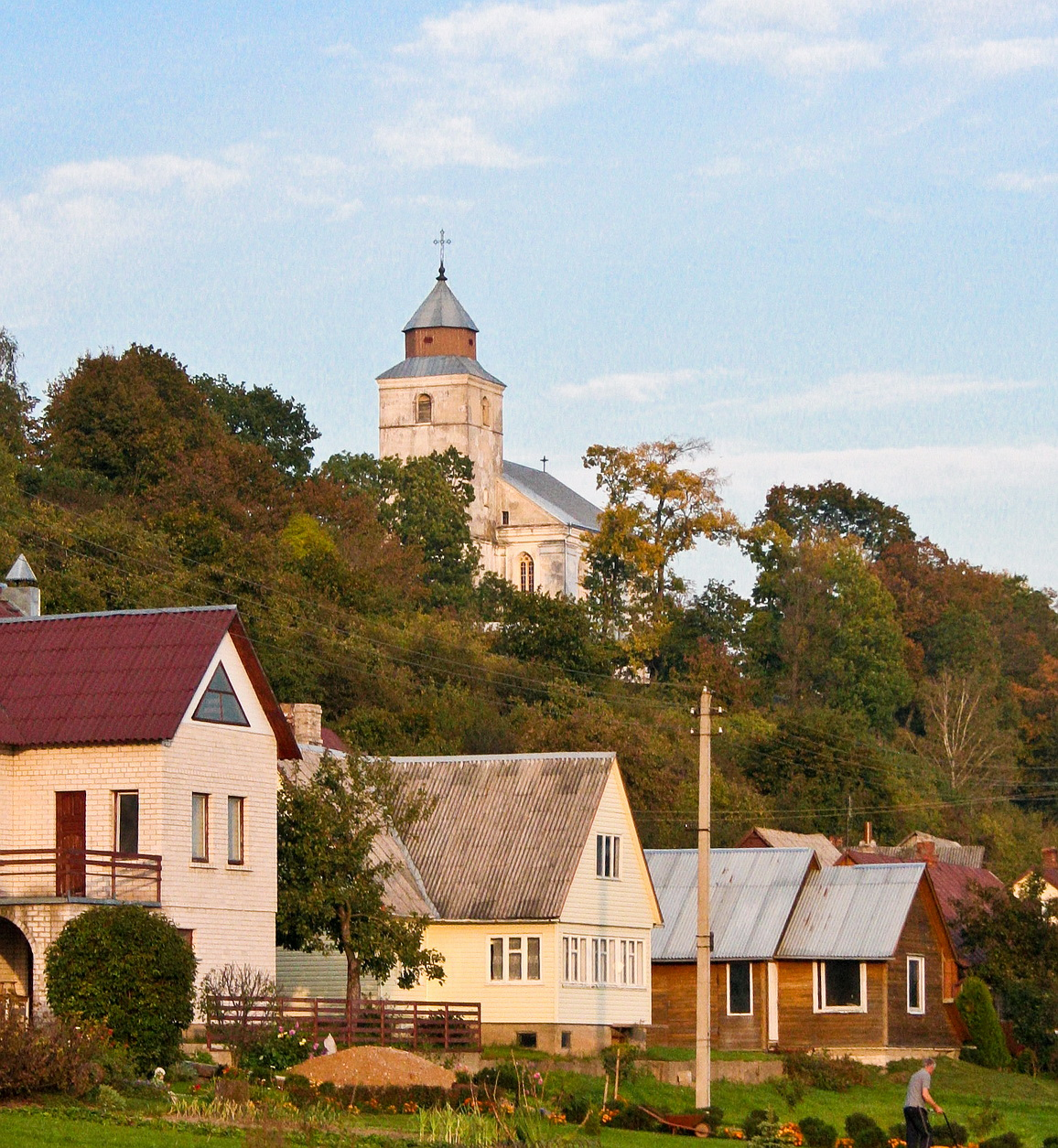 Veliuona, Lithuania